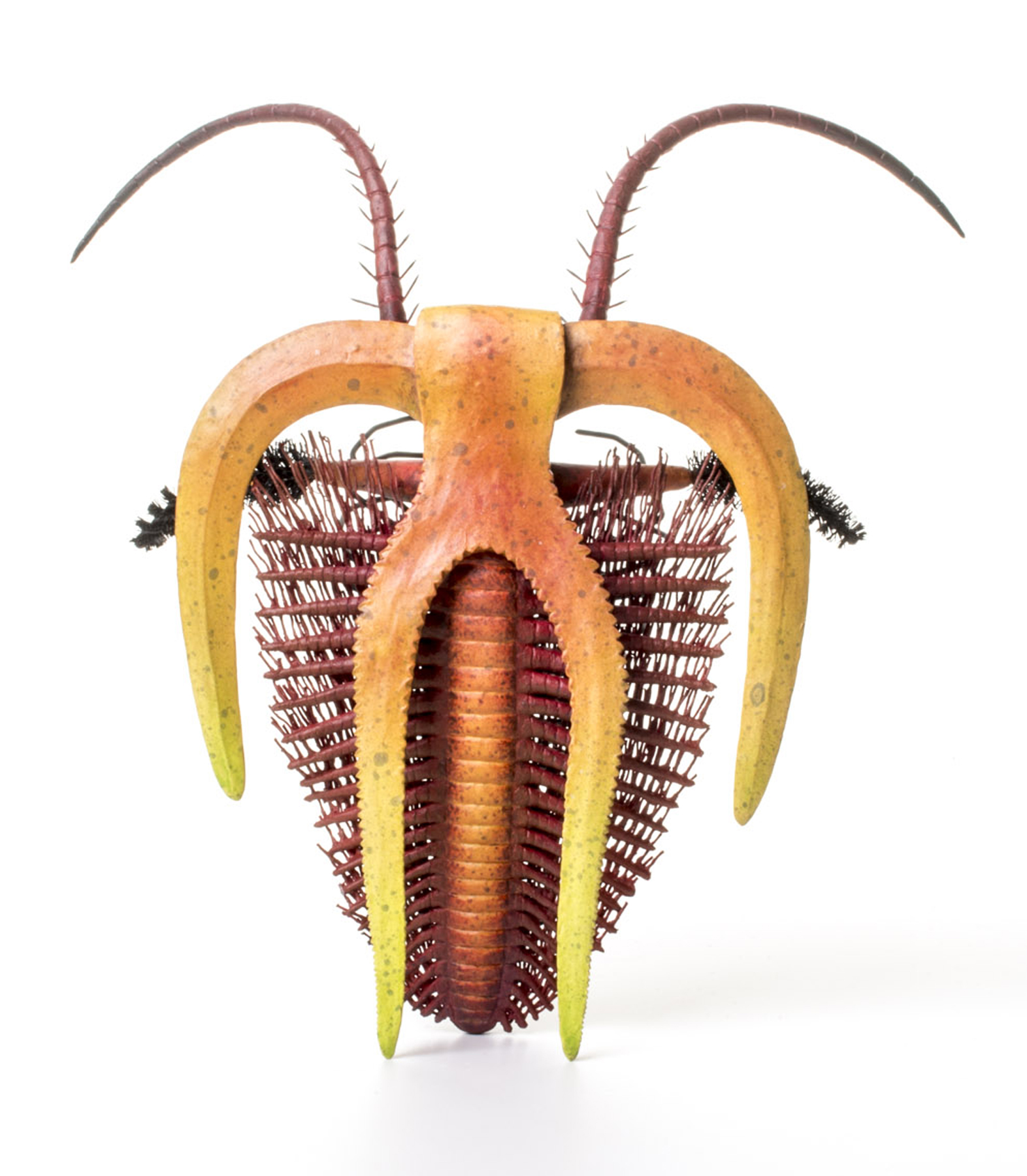 Ricostruzione in scala 5:1.